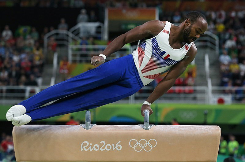 Gymnastics at the 2016 Summer Olympics